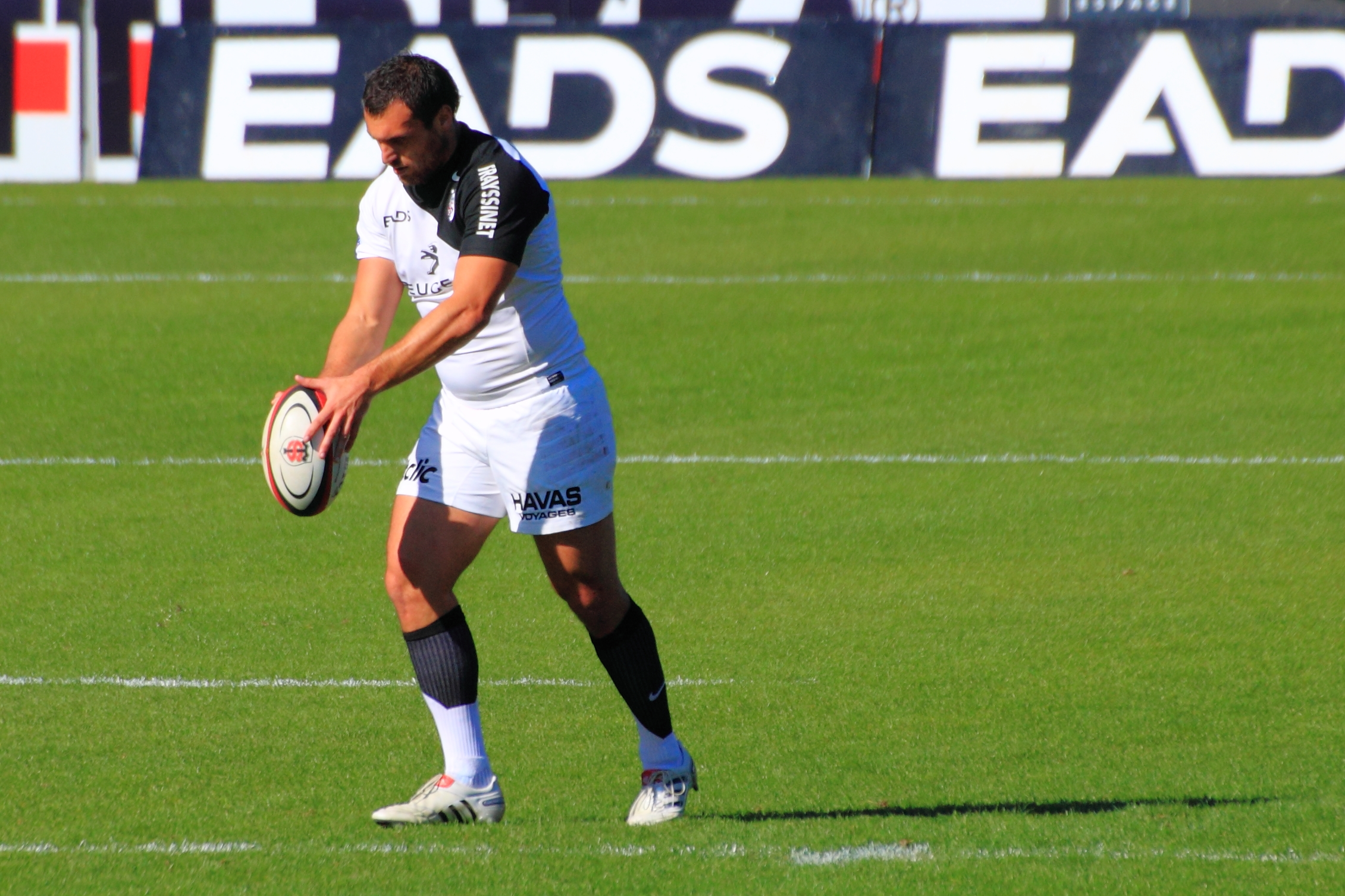 Lionel Beauxis tentant une pénalité lors de la rencontre de top 14 Stade toulousain vs Union Bordeaux Bègles du 22 octobre 2011